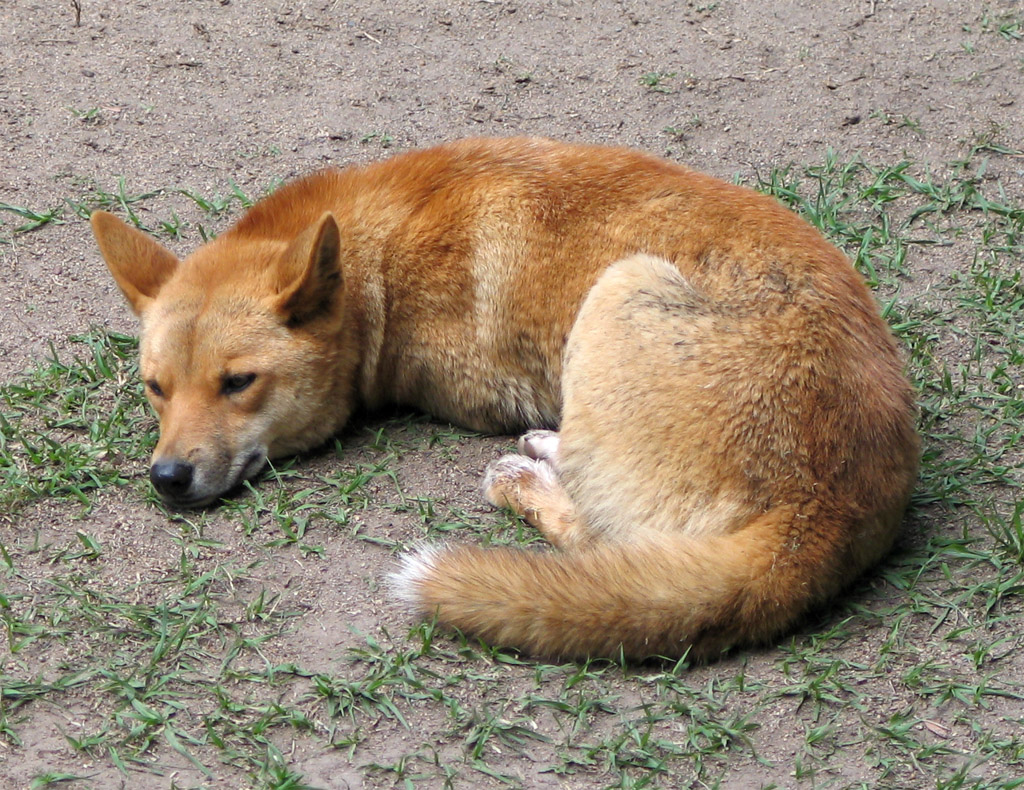 Dingo v Australské zoo, Queensland, Austrálie.